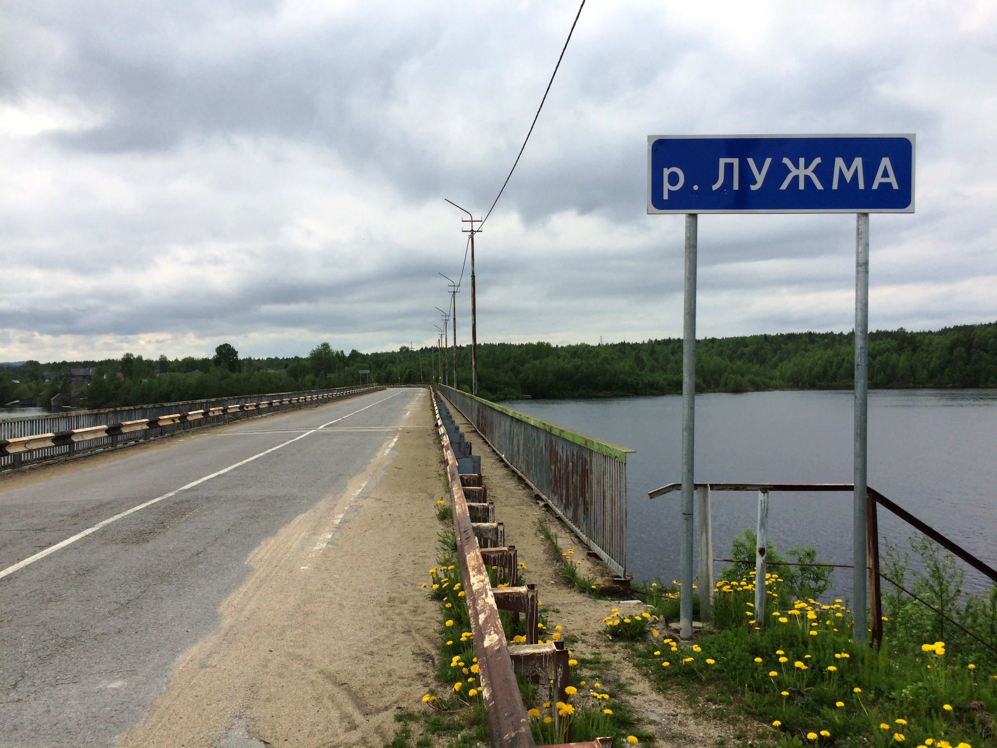 Р. Лужма